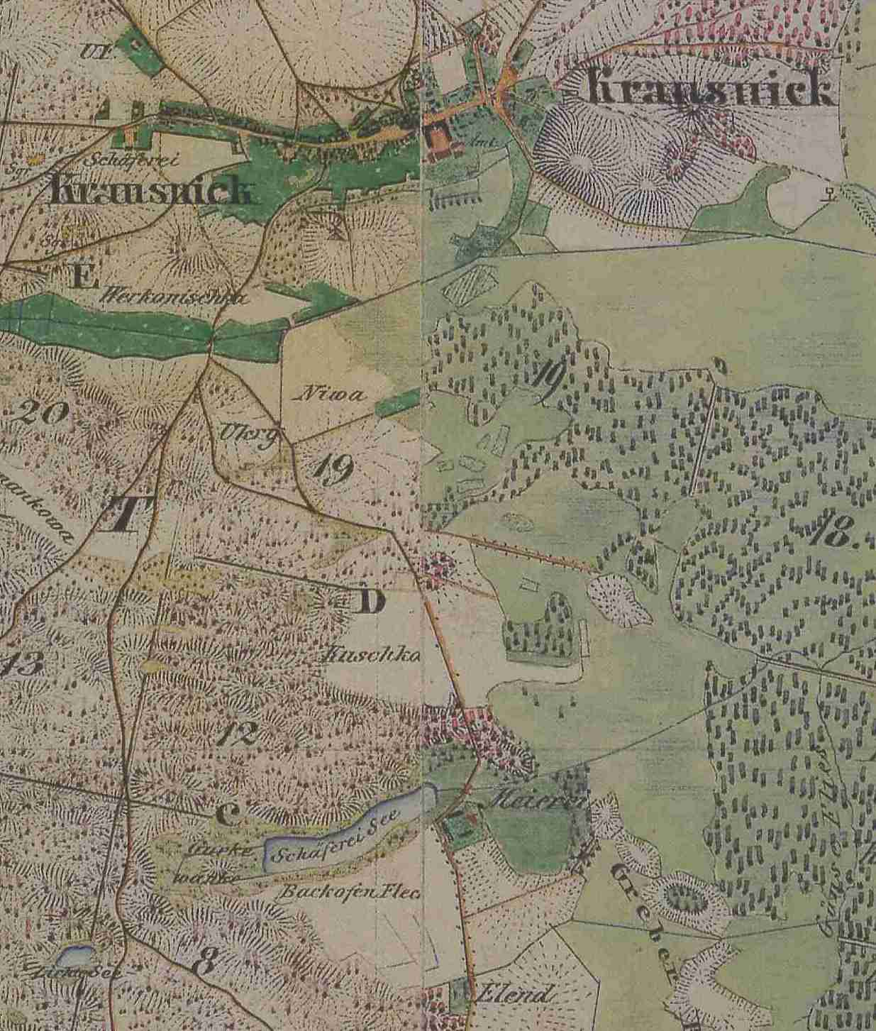 Krausnik, Ortsteil der Gemeinde Krausnick-Groß Wasserburg, Lkr. Dahme-Spreewald, Brandenburg, Deutschland, Ausschnitte aus den Urmesstischblättern 3948 Oderin von 1841 und 3949 Schlepzig von 1846